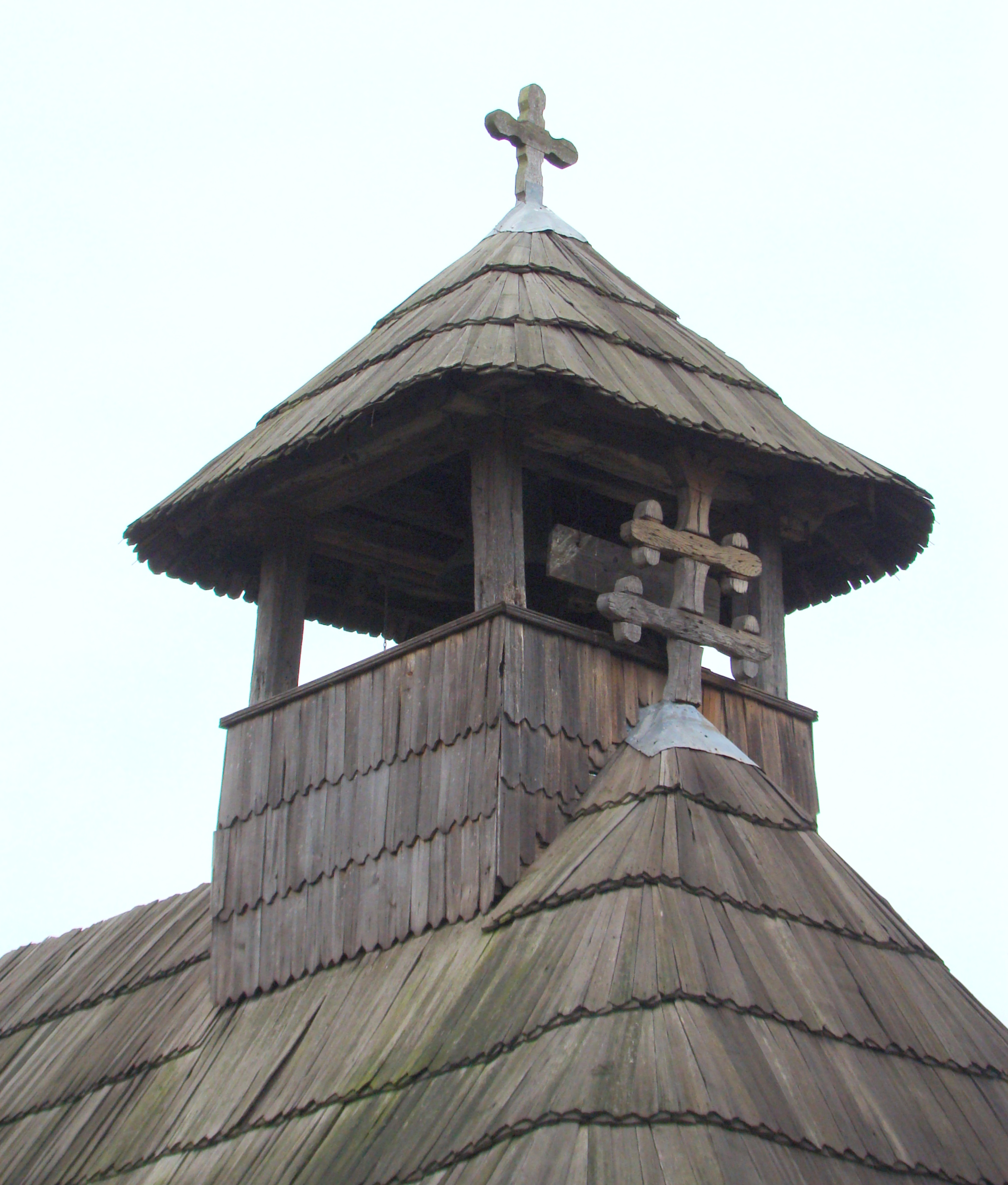 Biserica de lemn „Toți Sfinții” din Tălpășești, Gorj